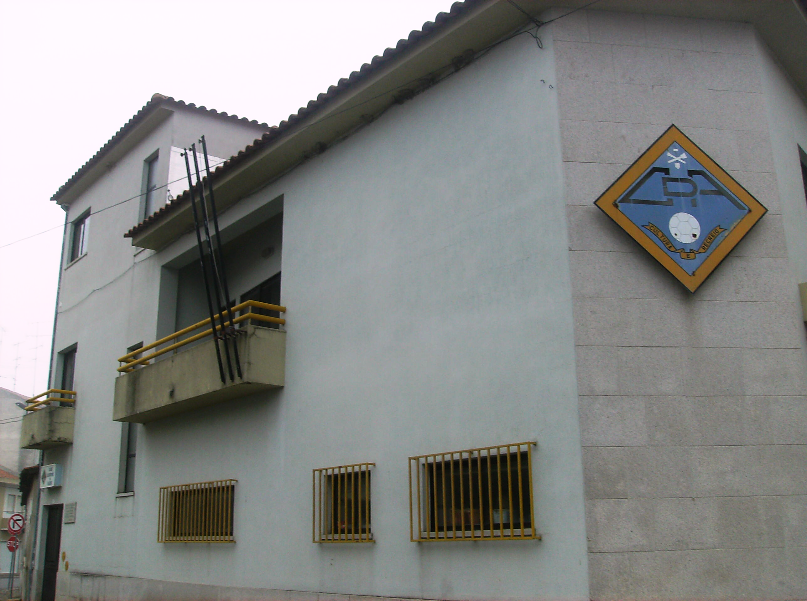 Sede do Clube Desportivo de Alcains